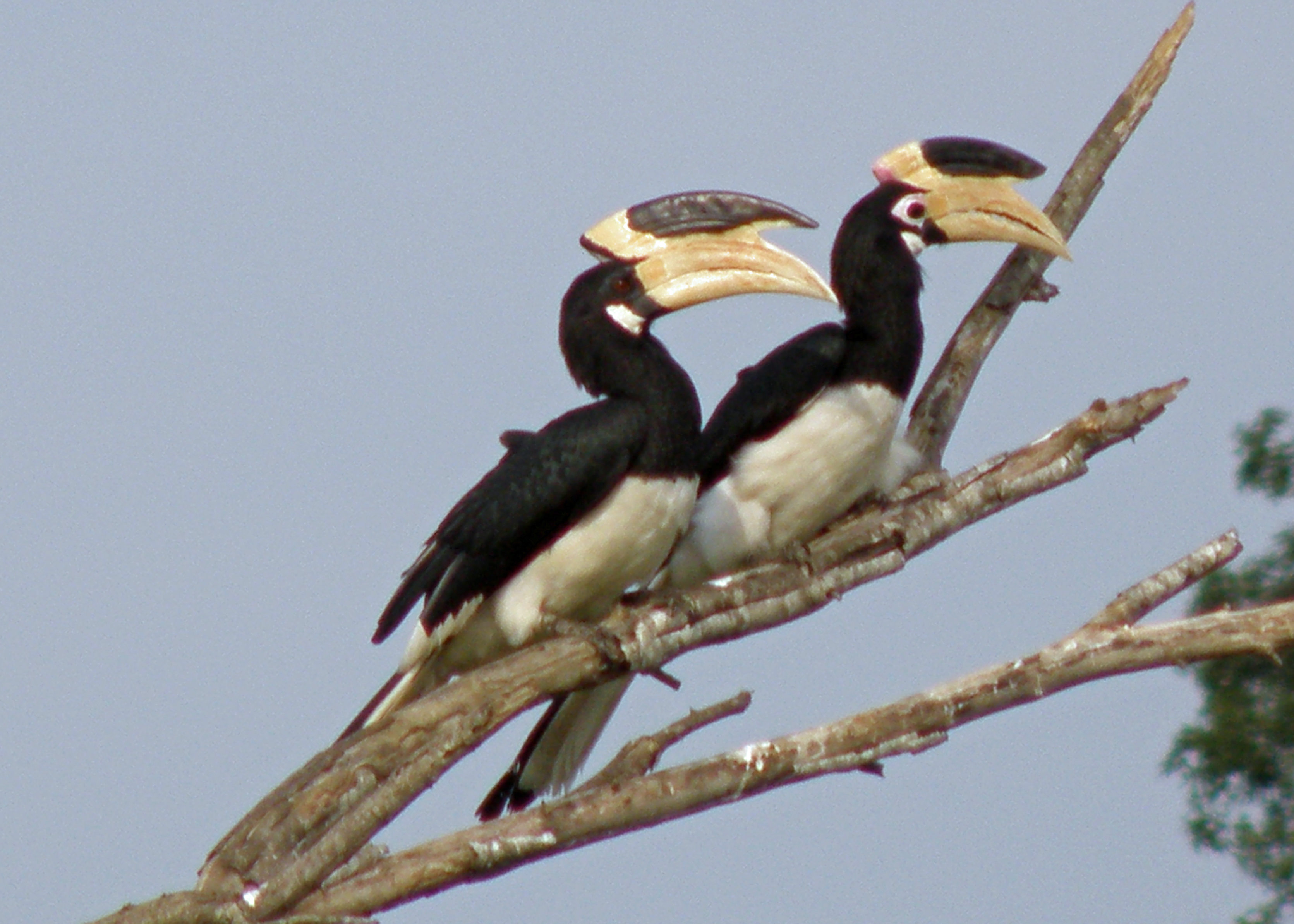 Un couple de Calaos de Malabar : Le mâle à l'oeil rouge cerclé de noir, la femelle l'oeil noir cerclé de blanc - Réserve d'Uda Walawe - Sri Lanka